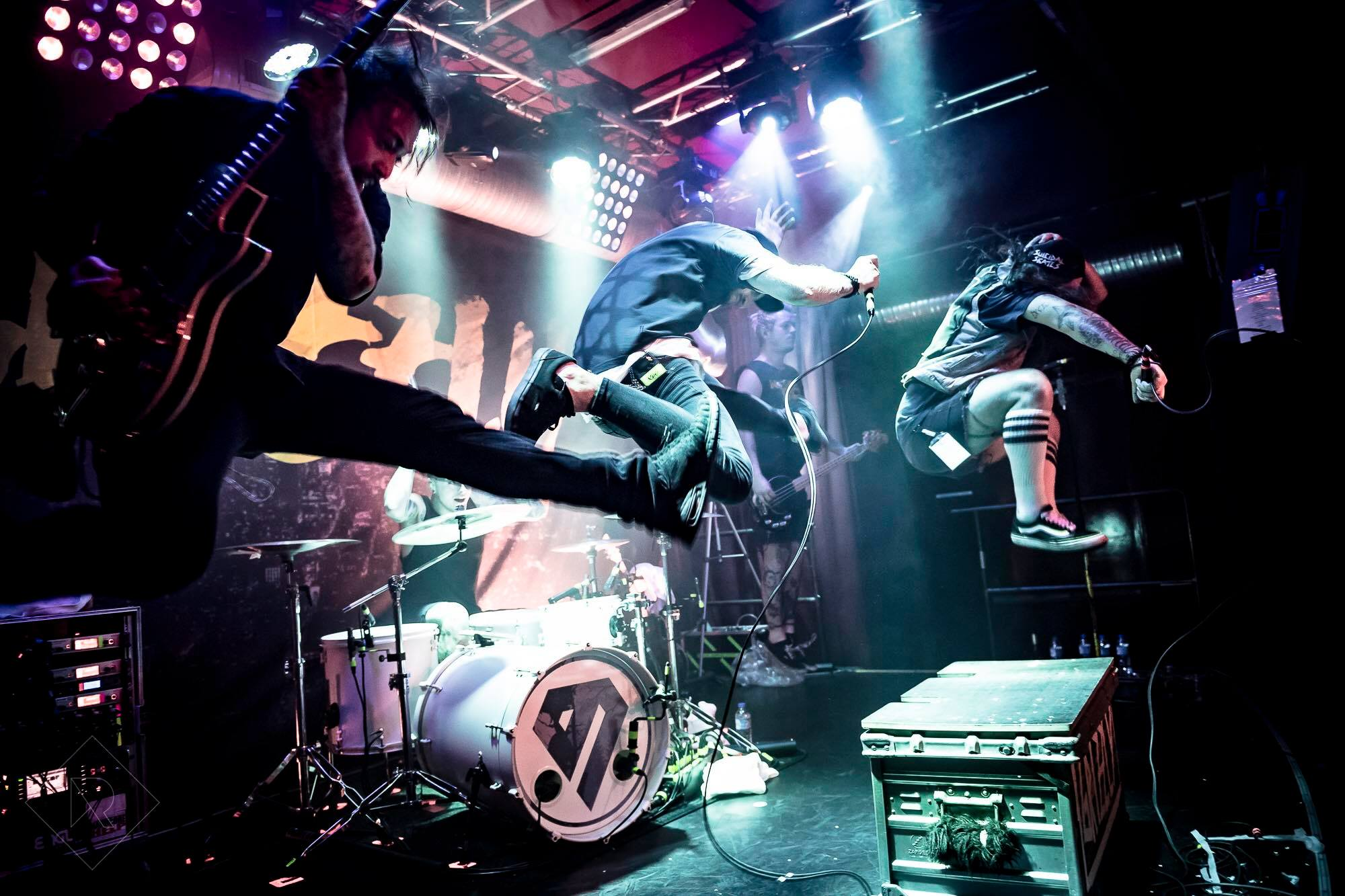 Gizzly live